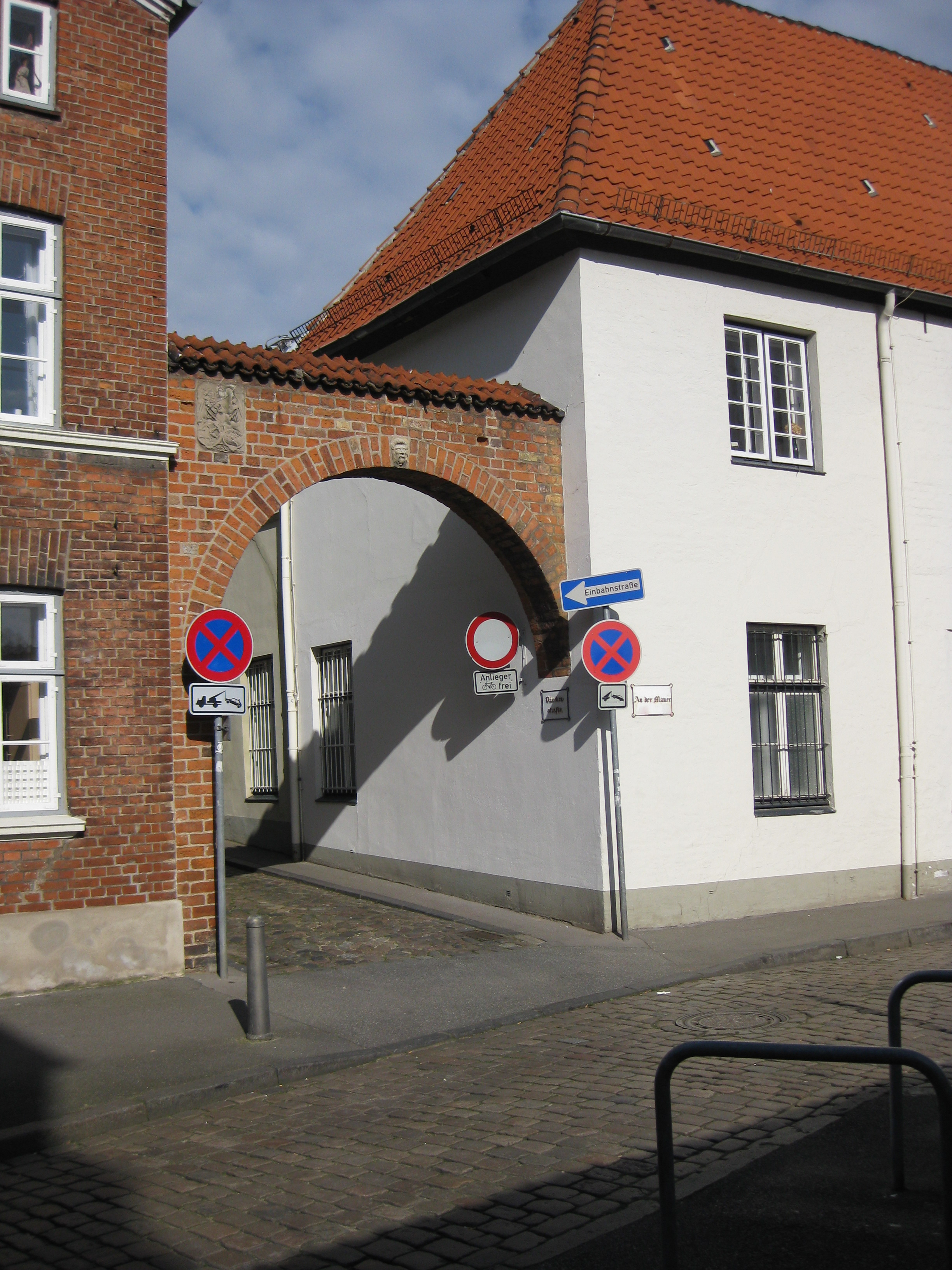 Schwippbogen aus Backstein mit Sandsteinreliefs über die Düvekenstraße, von der Straße An der Mauer aus gesehen. (Schwippbögen erfüllen statische Funktion, indem sie Kräfte über die Straße hinweg ableiten.)